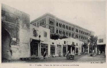 Souk rue des selliers